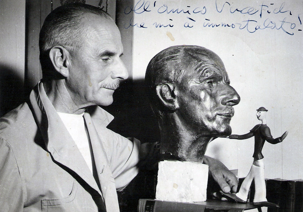 Foto che ritrae Sergio Tofano assieme al ritratto scultoreo in gesso realizzato dall'artista Mario Mirko Vucetich.